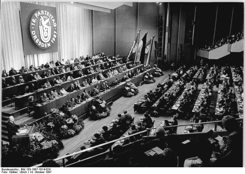 ADN-ZB Häßler-14.10.87-kb-Dresden: 16. Parteitag der CDU - Der Parteitag der Christlich-Demokratischen Union Deutschlands wurde im Kulturpalast der Elbemetropole eröffnet. Das Referat vor den 1 330 Delegierten hielt der Vorsitzende der CDU, Gerald Götting (am Rednerpult unten l.).